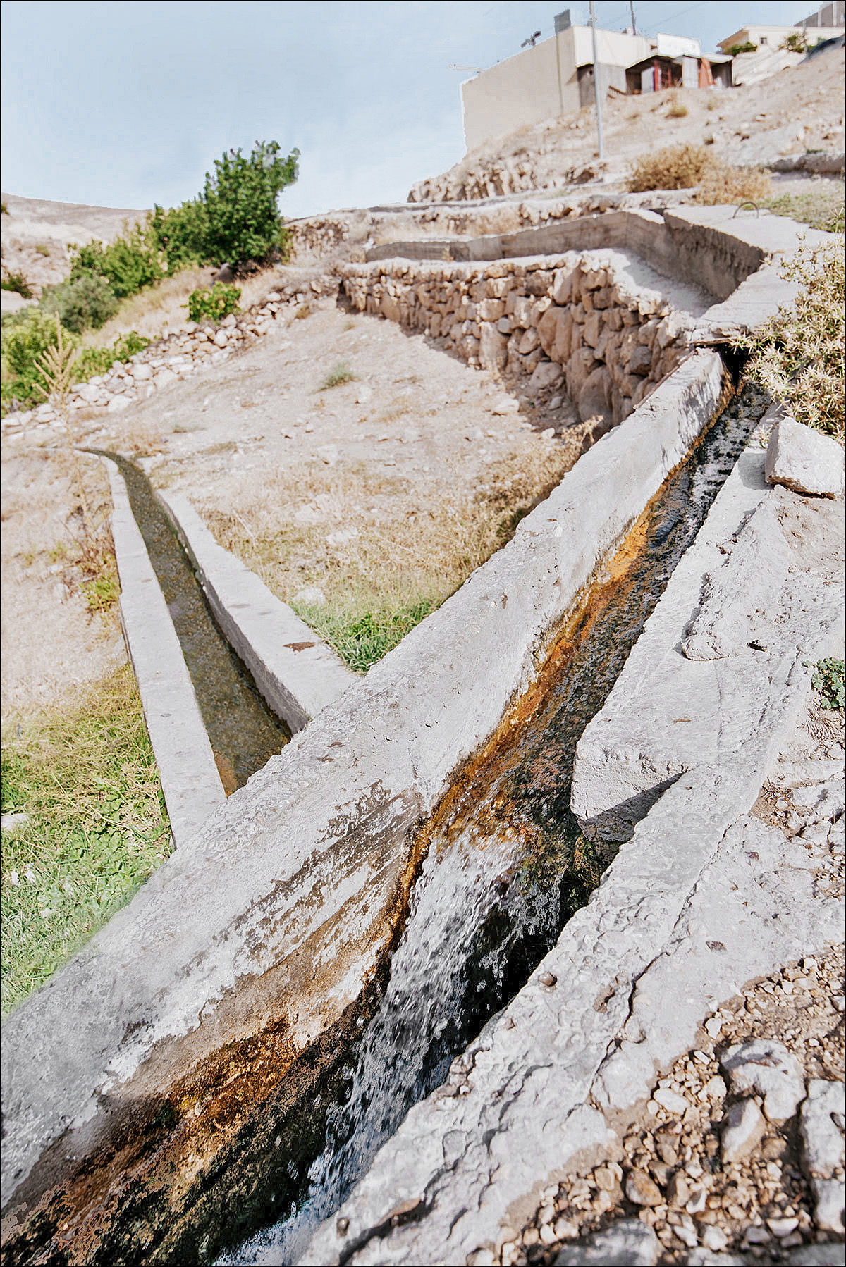 Canaux d'alimentation en eau au village de Wadi Mussa.